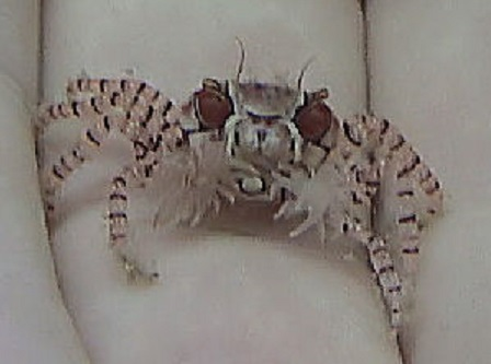 Triactis en Lybia edmondsoni